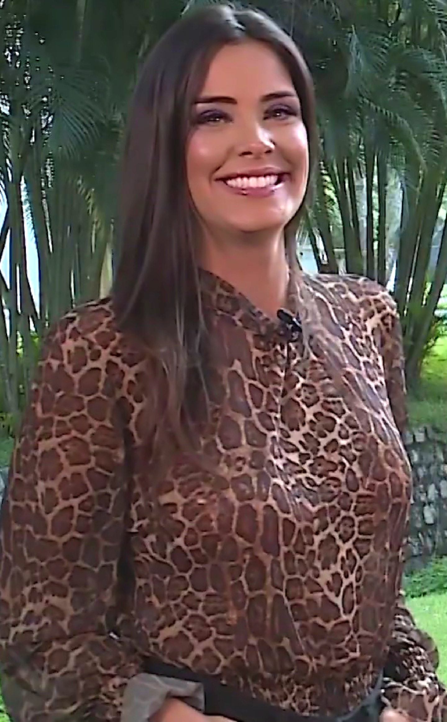 Ivy Moraes durante a sua participação no quadro #TBT BBB, exibido no canal no YouTube do Multishow em 21 de abril de 2020.